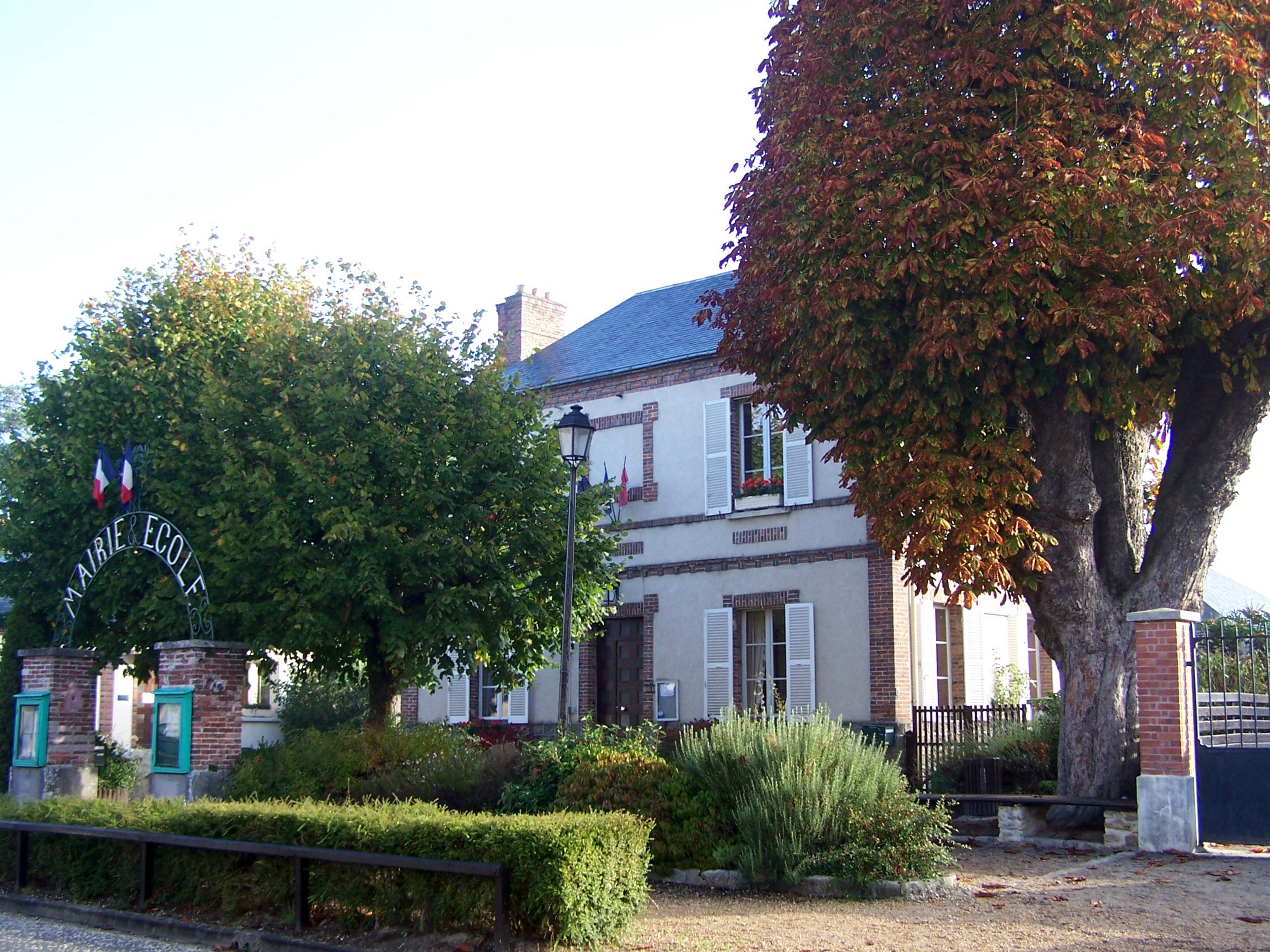 Mairie de Vieille-Église-en-Yvelines (Yvelines, France)